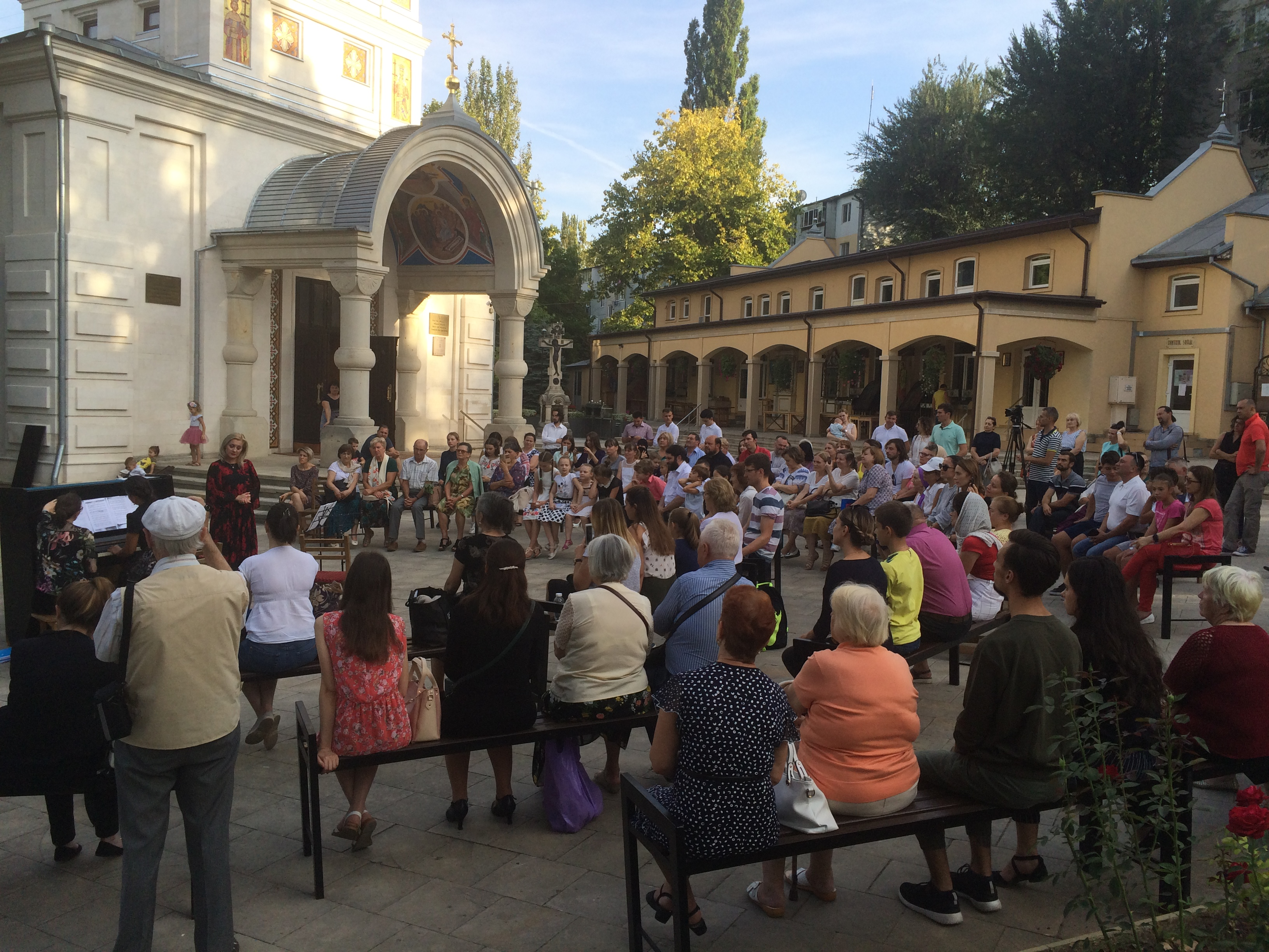 Les premiers concerts de musique classique vivante (moldave) dans un nombre de villages de la République de Moldavie, offerts par des musiciens du monde entier.